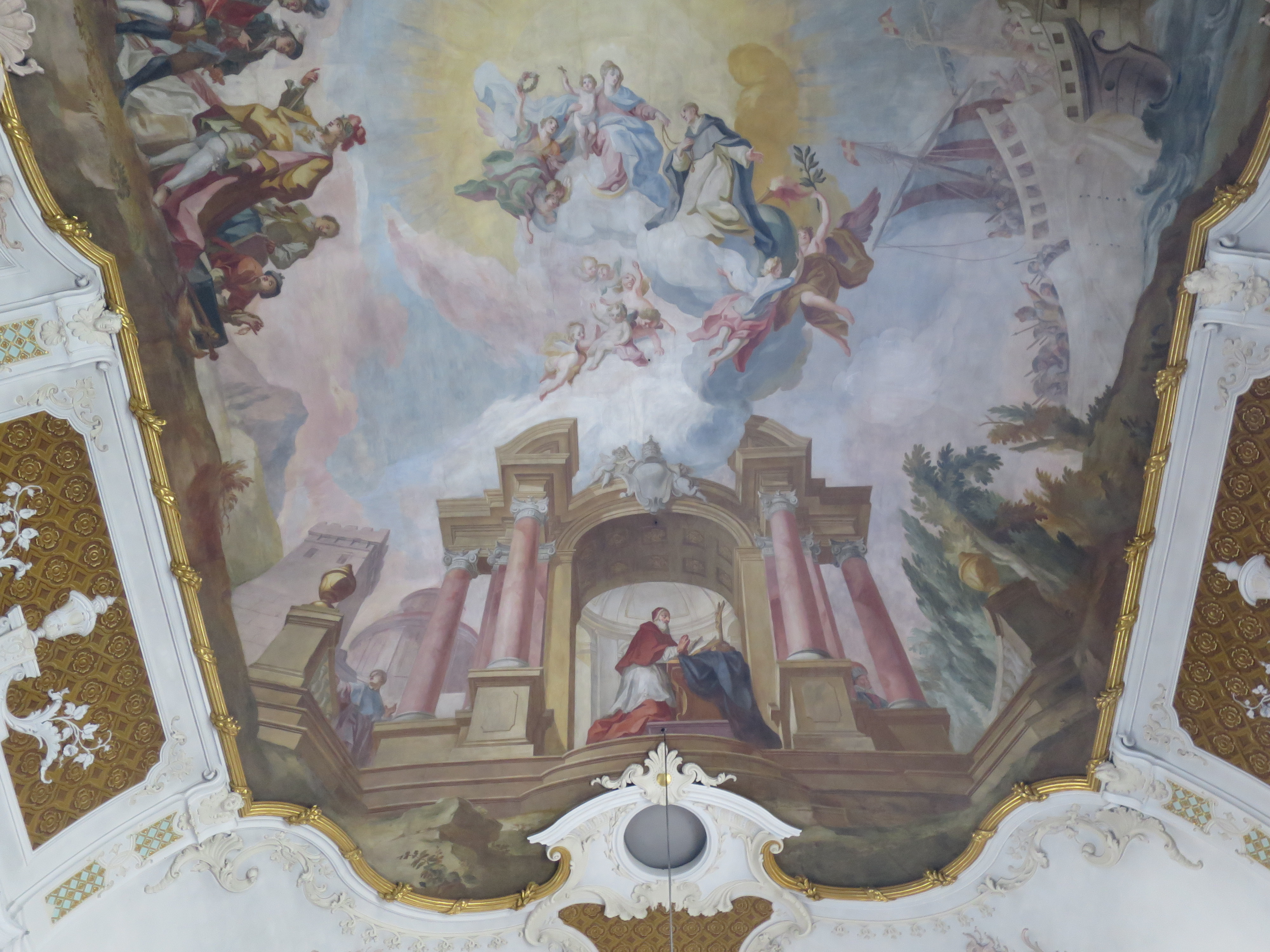 Die Seeschlacht von Lepanto. Deckenfresko von Johann Baptist Zimmermann 1738-1740 in der Pfarrkirche Mariä Himmelfahrt in Prien, Ausschnitt: Papst Pius V.